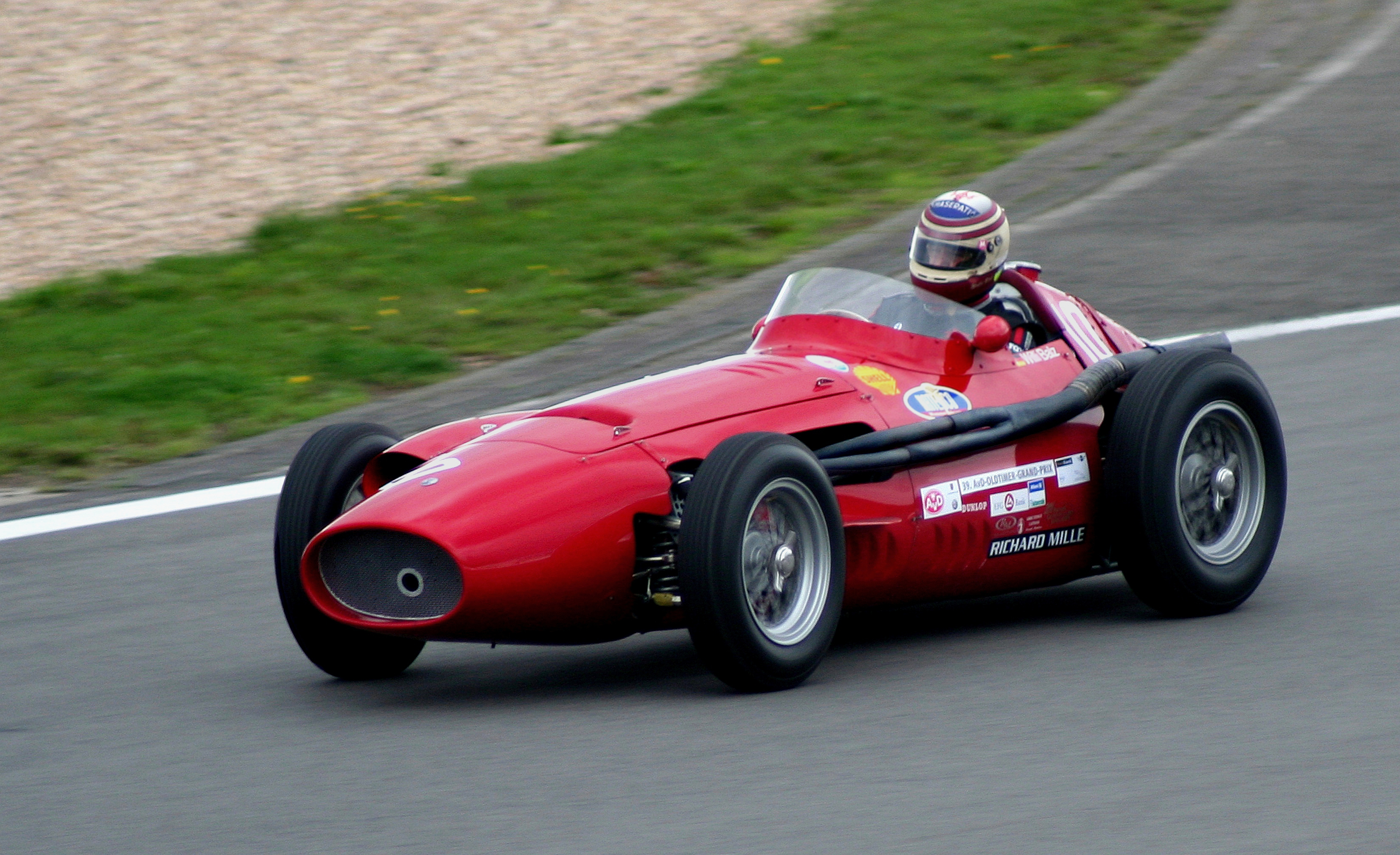 Maserati 250 F(Baujahr 1958) von Willi Balz beim AvD-Oldtimer-Grand-Prix in der Ford-Kurve des Nürburgrings